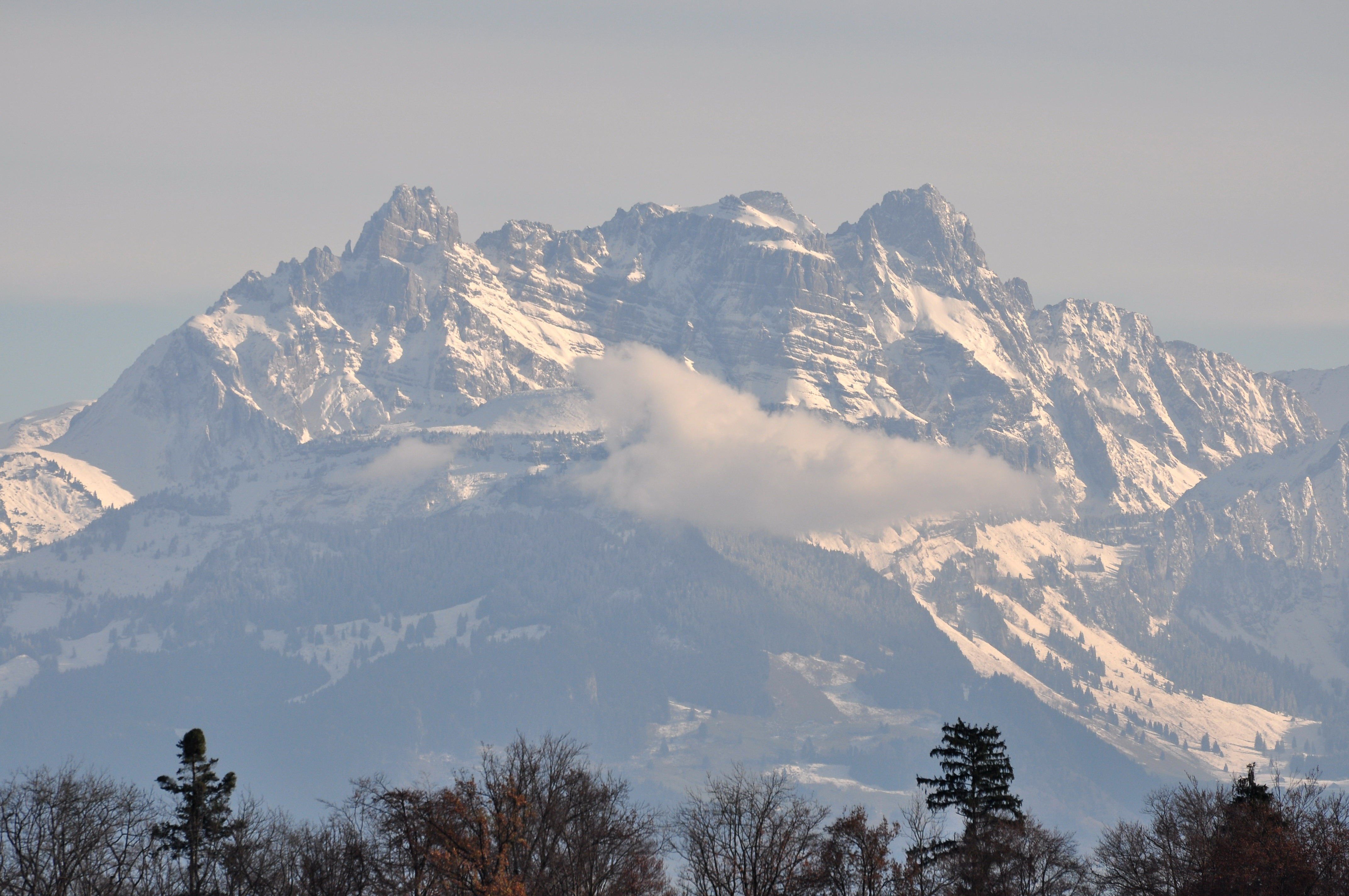 Fluebrig as seen from Bubikon (Switzerland)